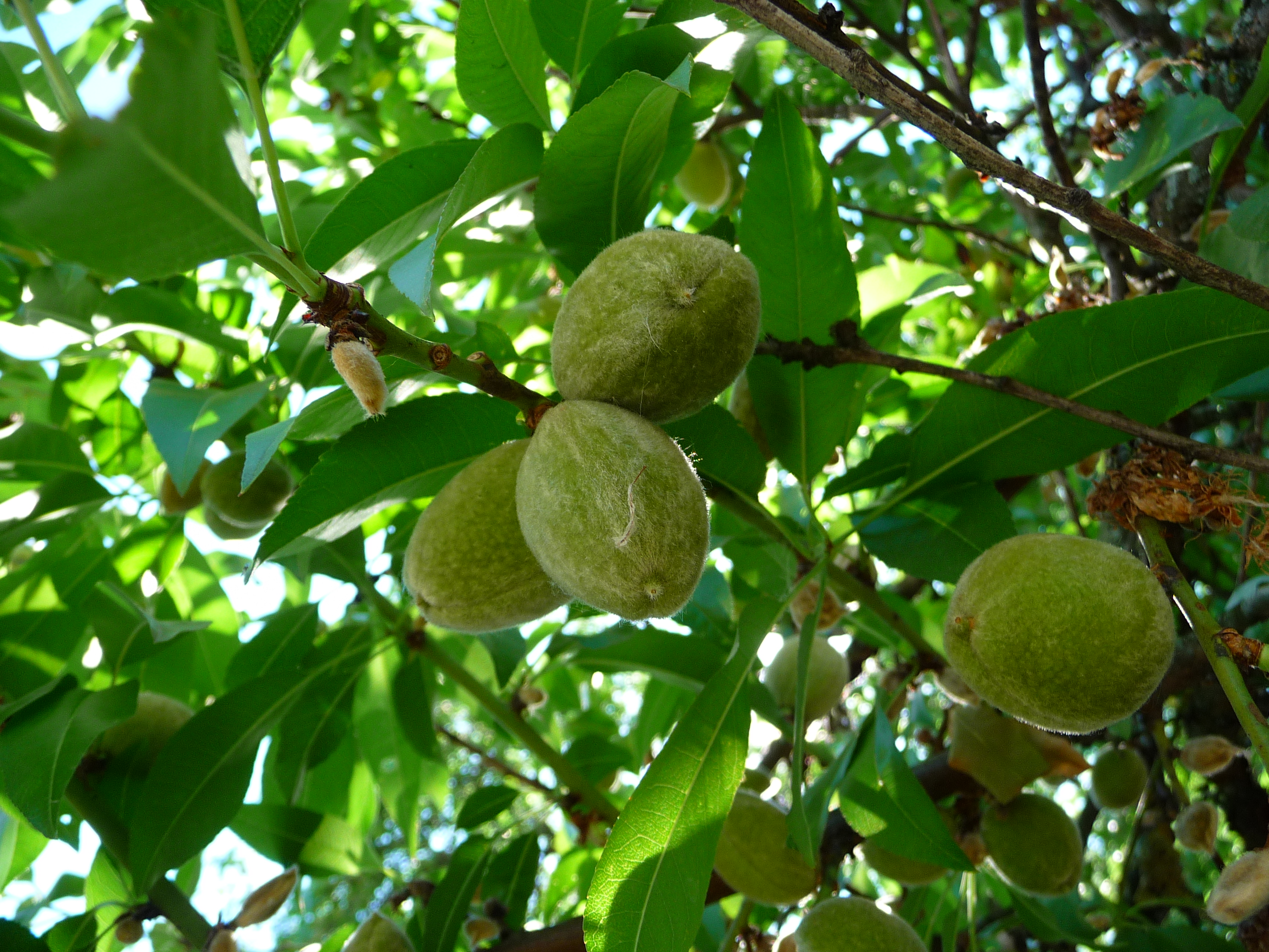 Unreife Früchte an einem Mandelbaum (Prunus dulcis)